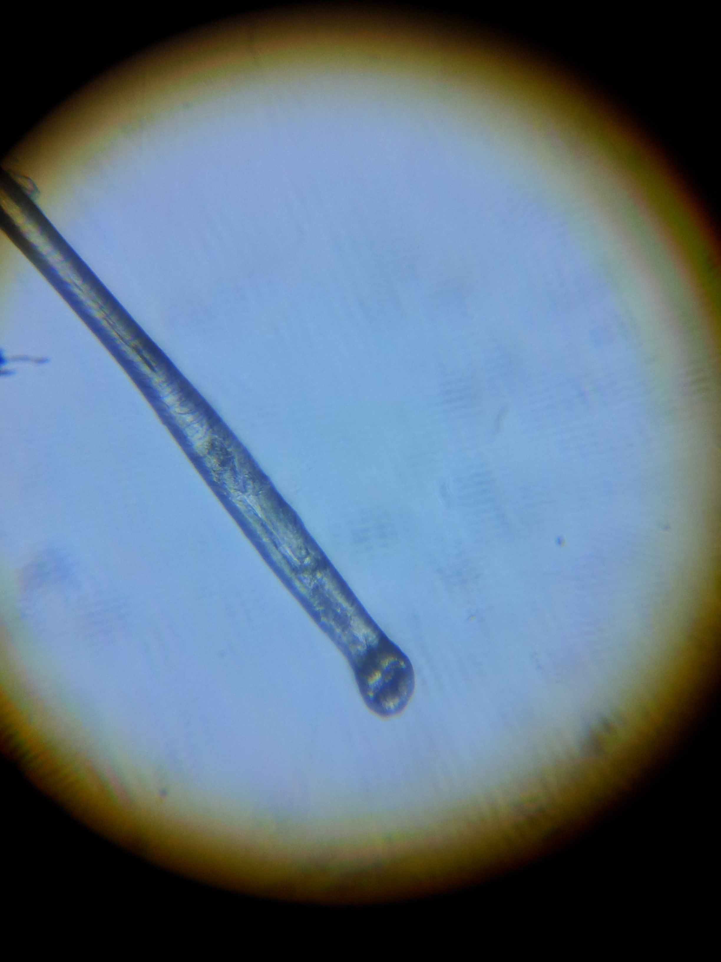 Włos psa York pod mikroskopem x200